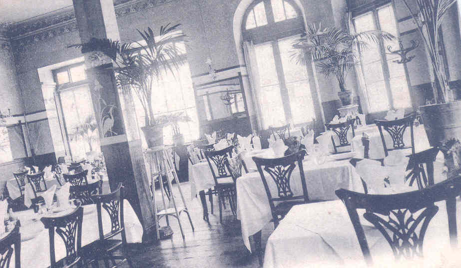 hotelaren barnealdea